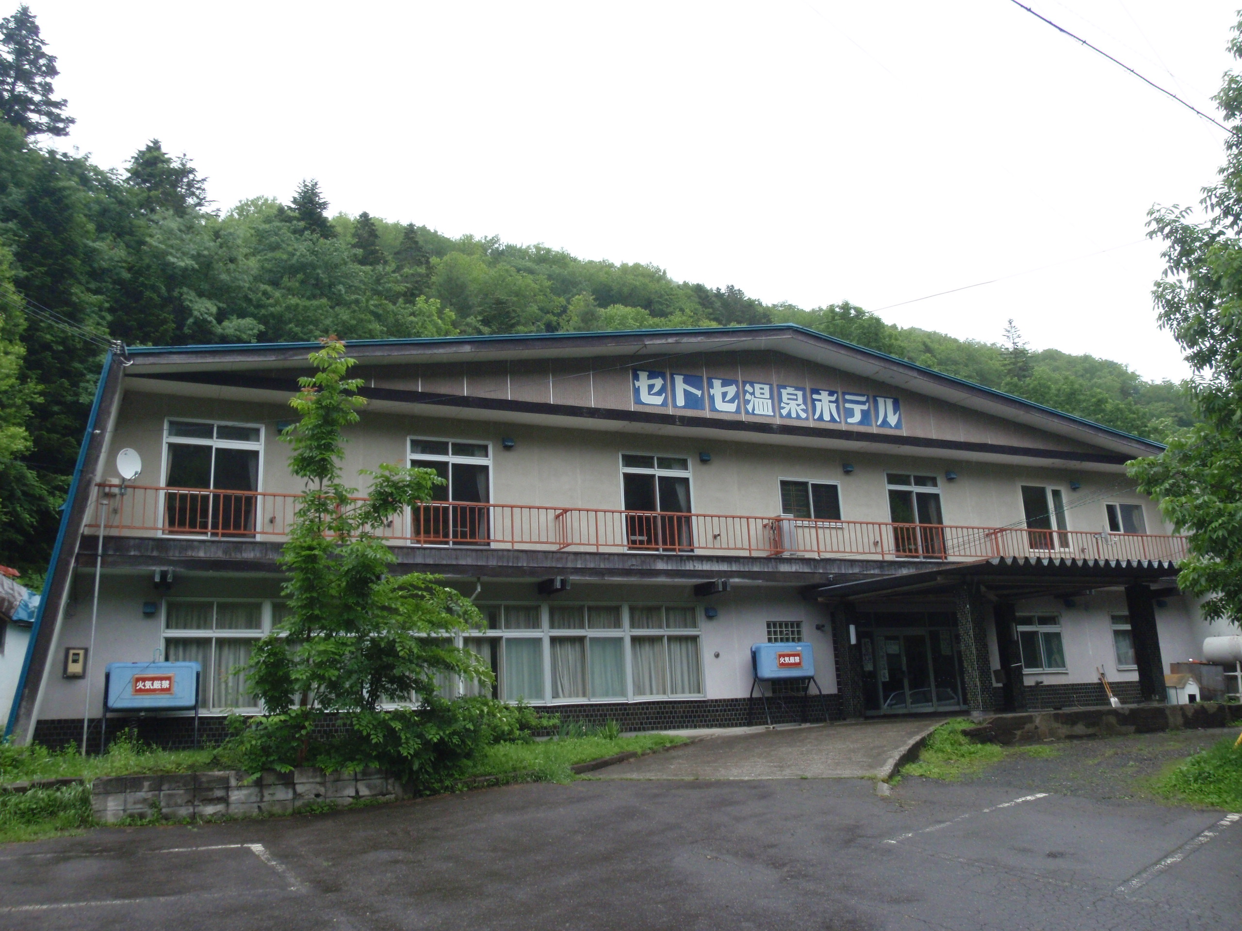 瀬戸瀬温泉、セトセ温泉ホテル